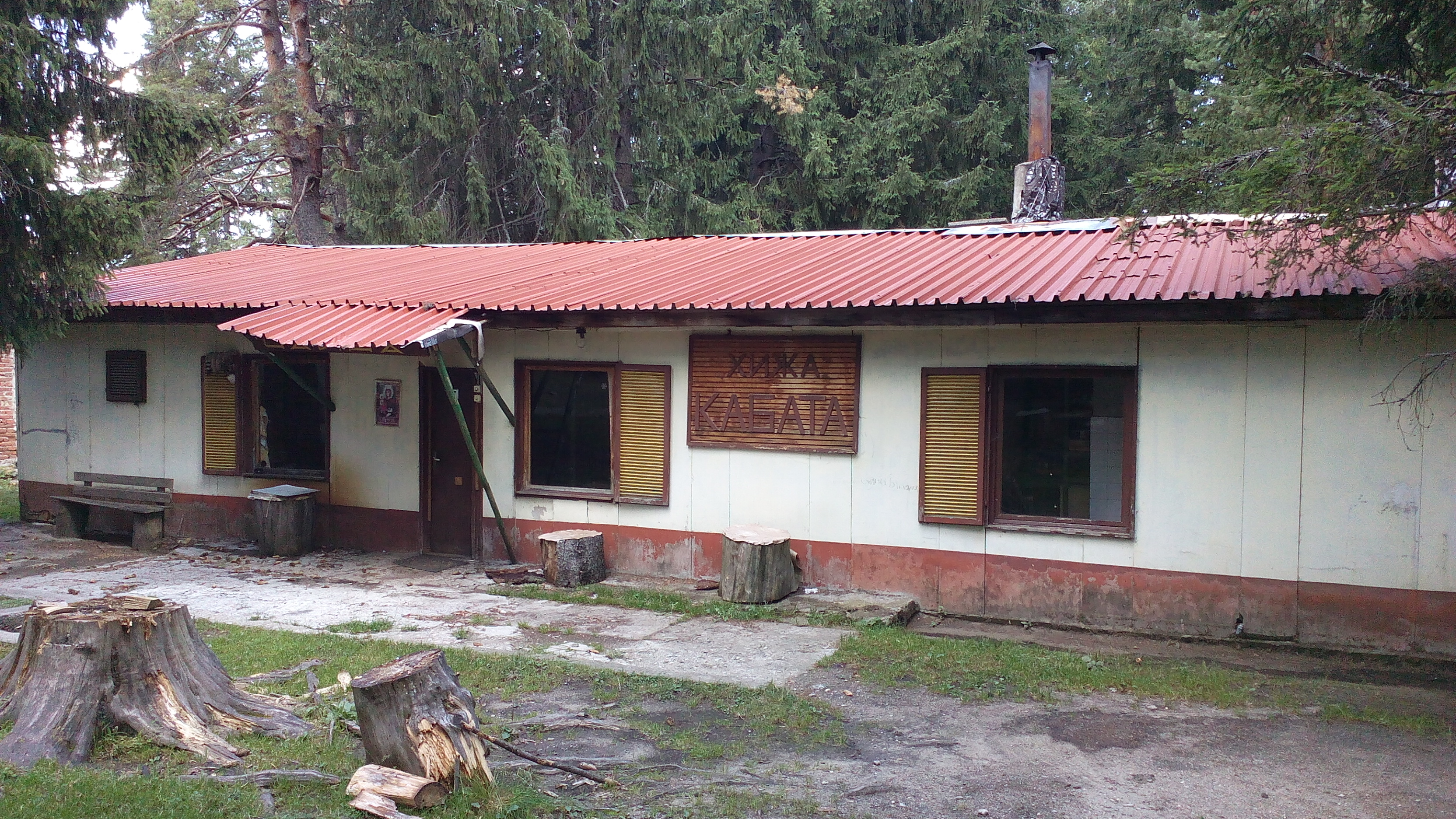 Hut "Kabata" in the Rhodopes